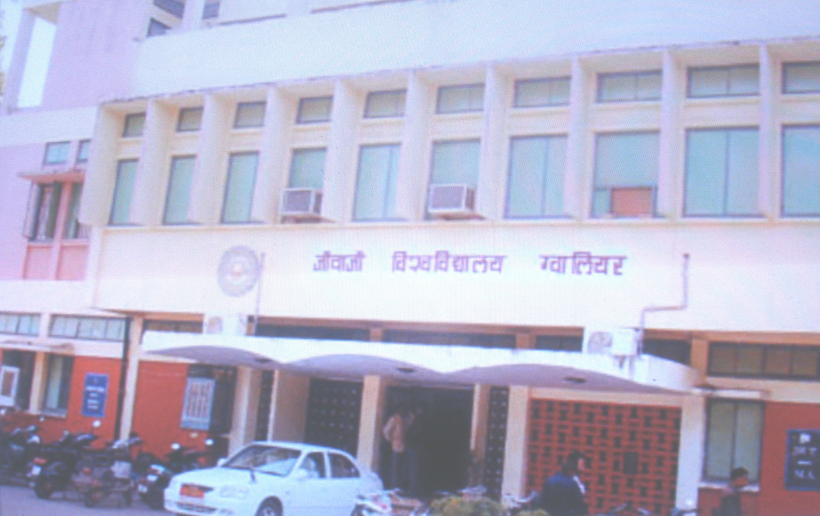 Jiwaji University Gwalior